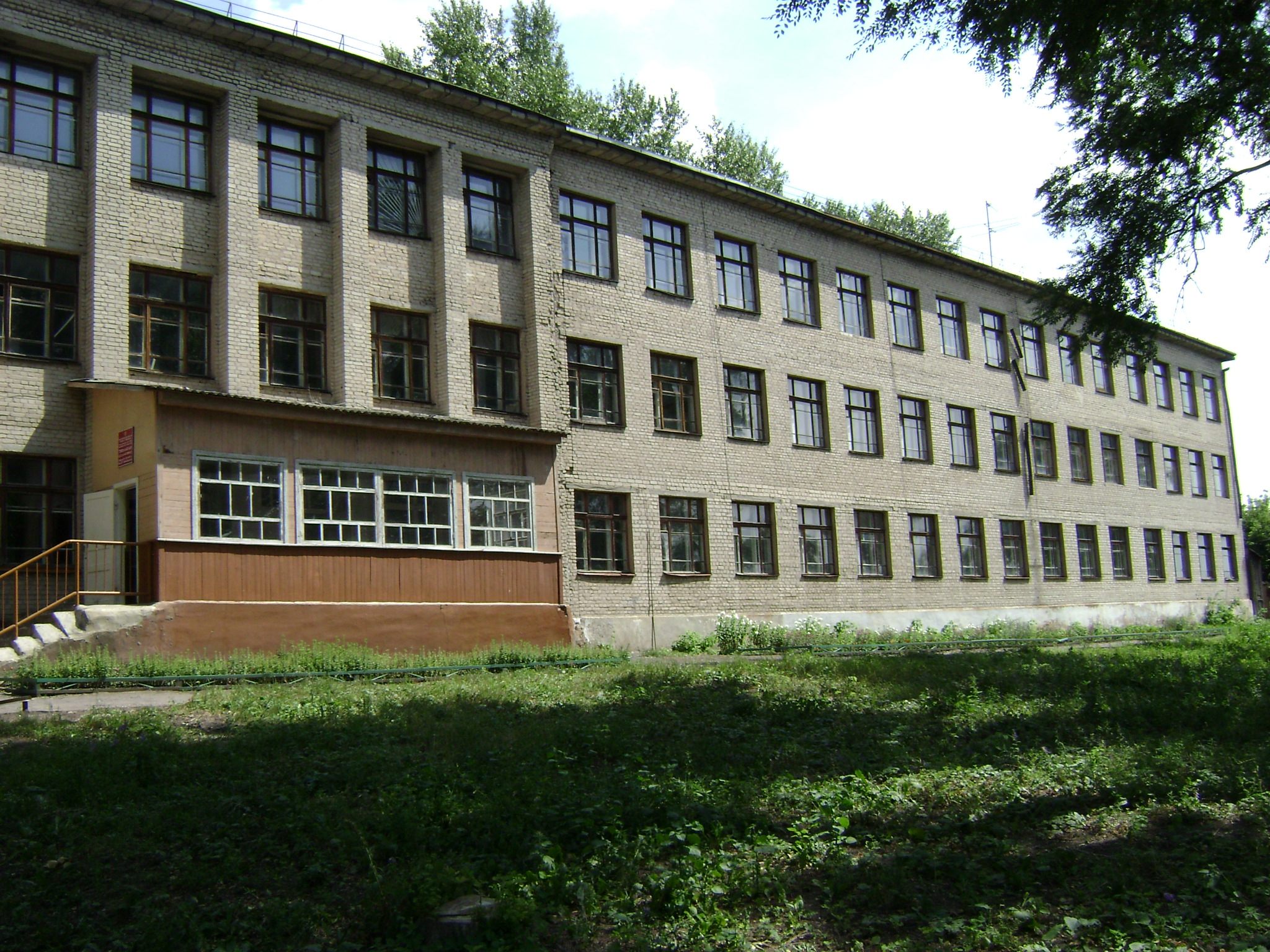 Горожанская школа-интернат. Вид со стороны Дона.